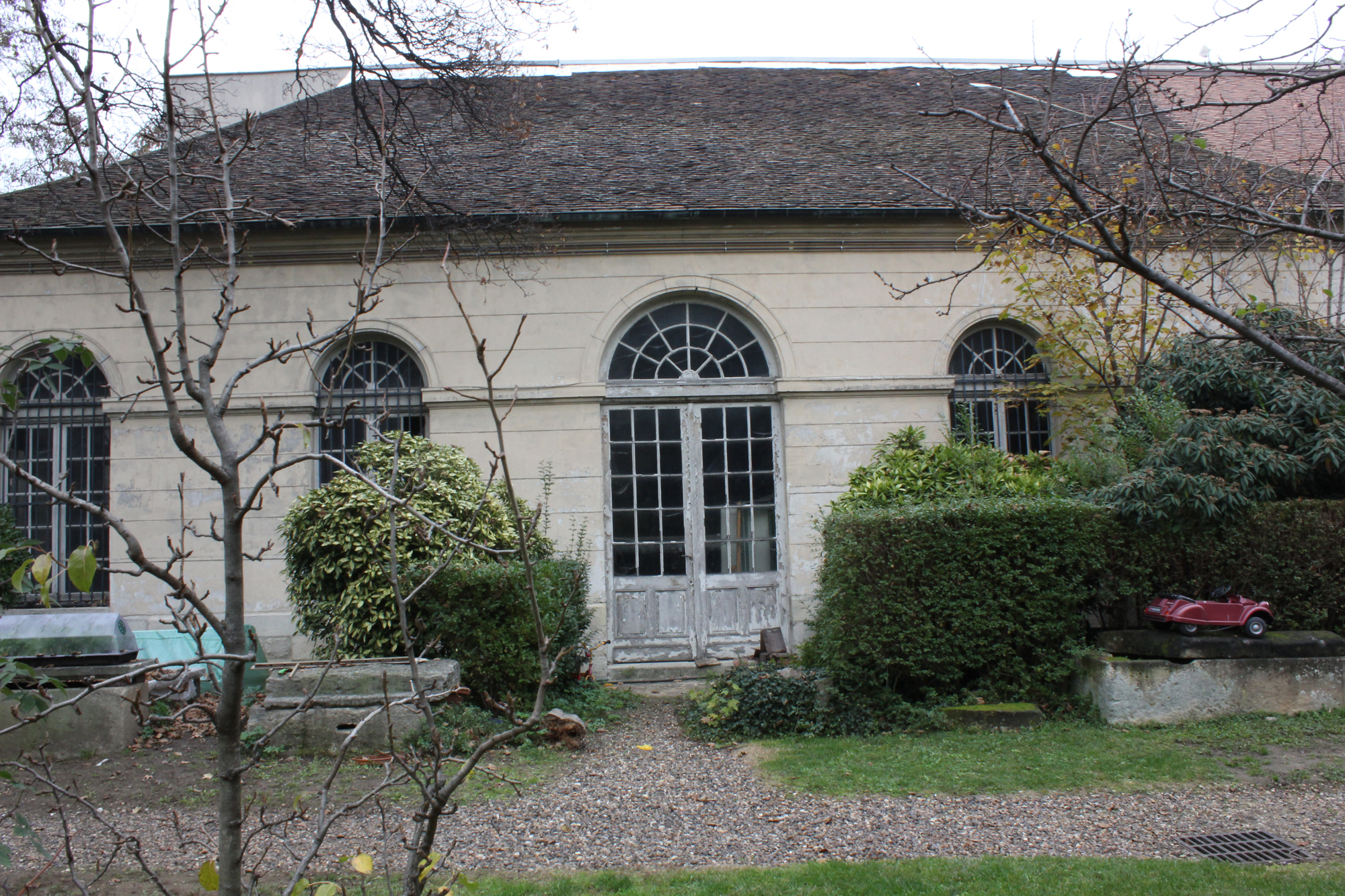 Orangerie abbatiale de la Basilique Saint-Denis construite à la fin du XVIIIe siècle.